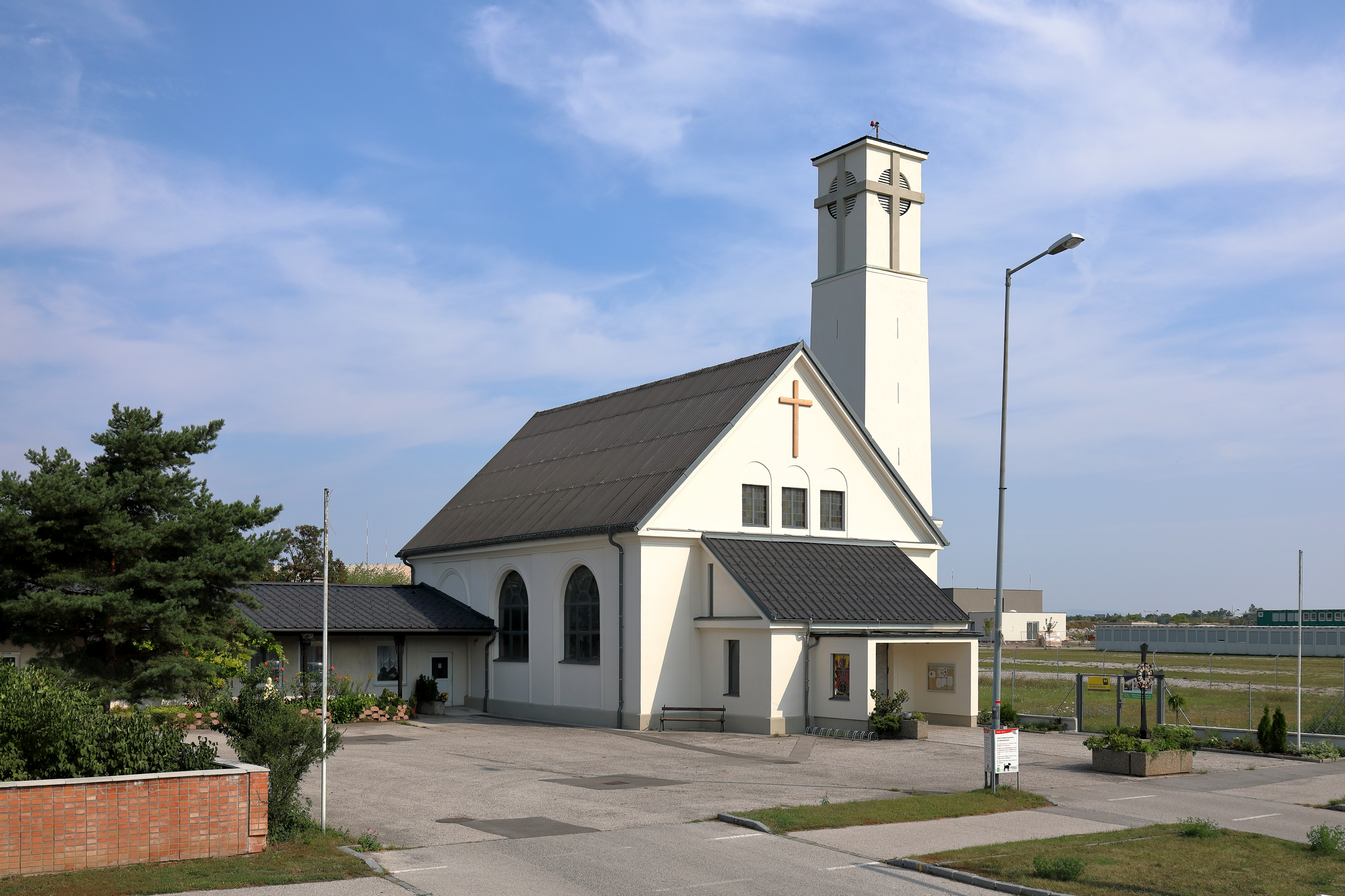 Südansicht der röm.-kath. Pfarrkirche St. Anton an der Adresse Flugfeldgürtel 17 in der niederösterreichischen Stadtgemeinde Wiener Neustadt.Das Gebäude war ursprünglich das Zentralheizungs-Kesselhaus der ehem. Fliegerkaserne. Dieses Haus wurde zu einer Kirche umgebaut und 1934 geweiht. Im Jahr 1937 erfolgte der Umbau des Schornsteins zu einem freistehenden dreigeschossigen Glockenturm. Von 1960 bis 1964 wurde die Kirche nach Plänen von Architekt Josef Patzelt nochmals umgebaut und erweitert.